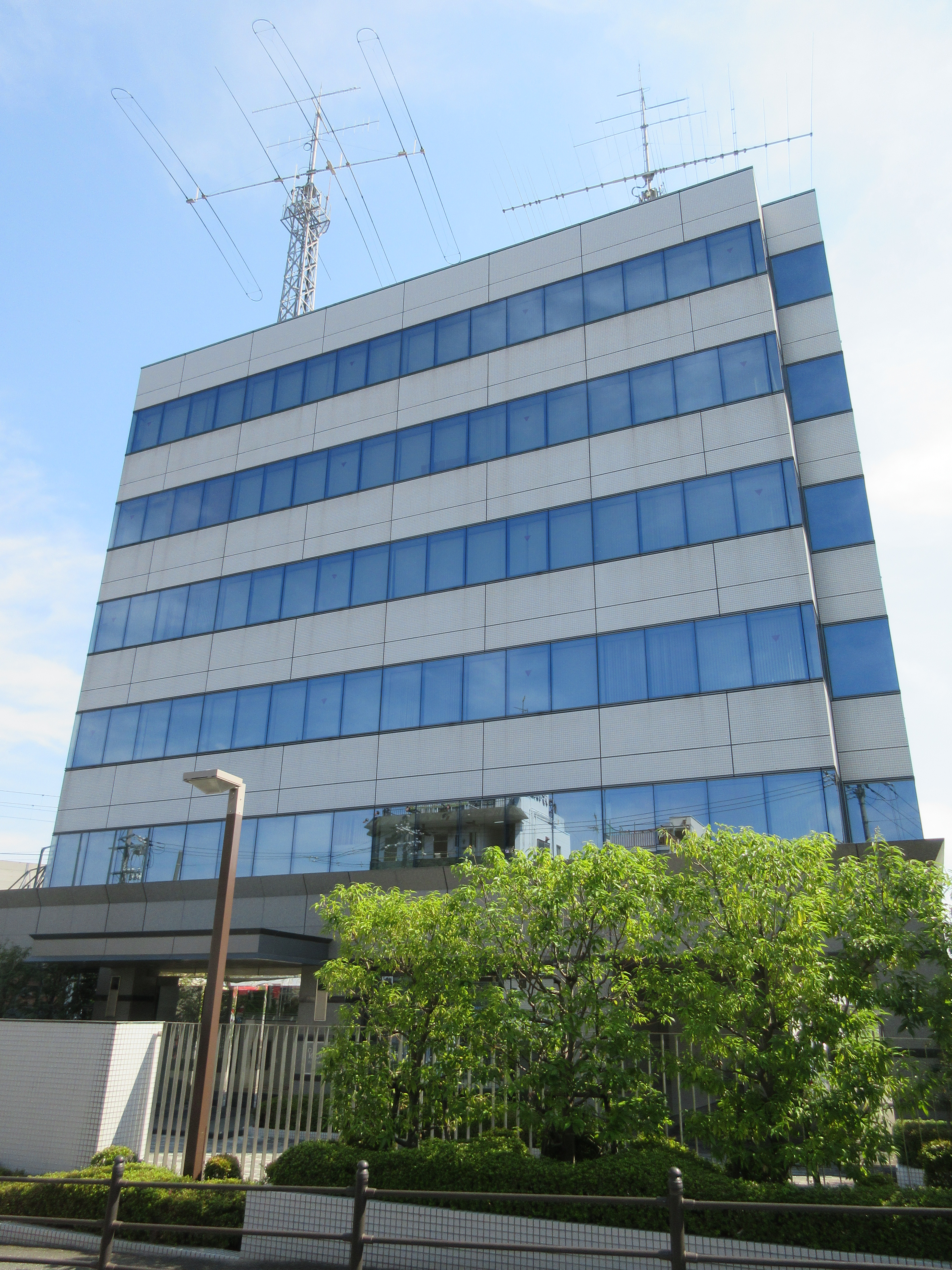 アイコム本社